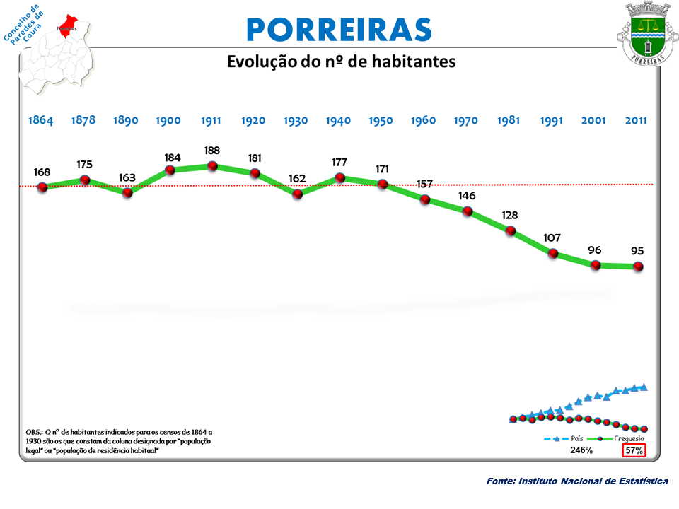 Censos 1864/2011